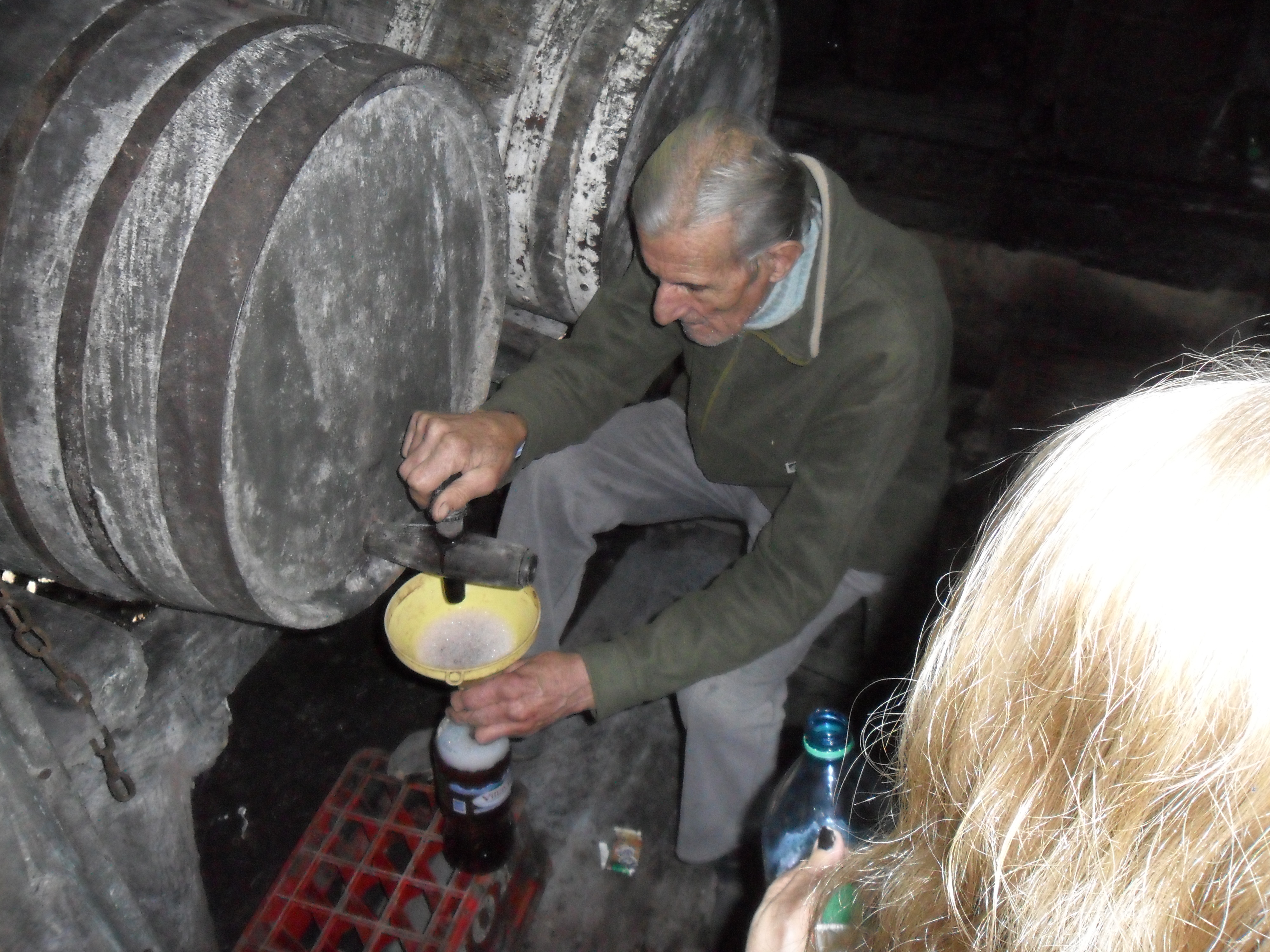 Cristina Marzano, 64 años, UTN FRA, Villa Dominico